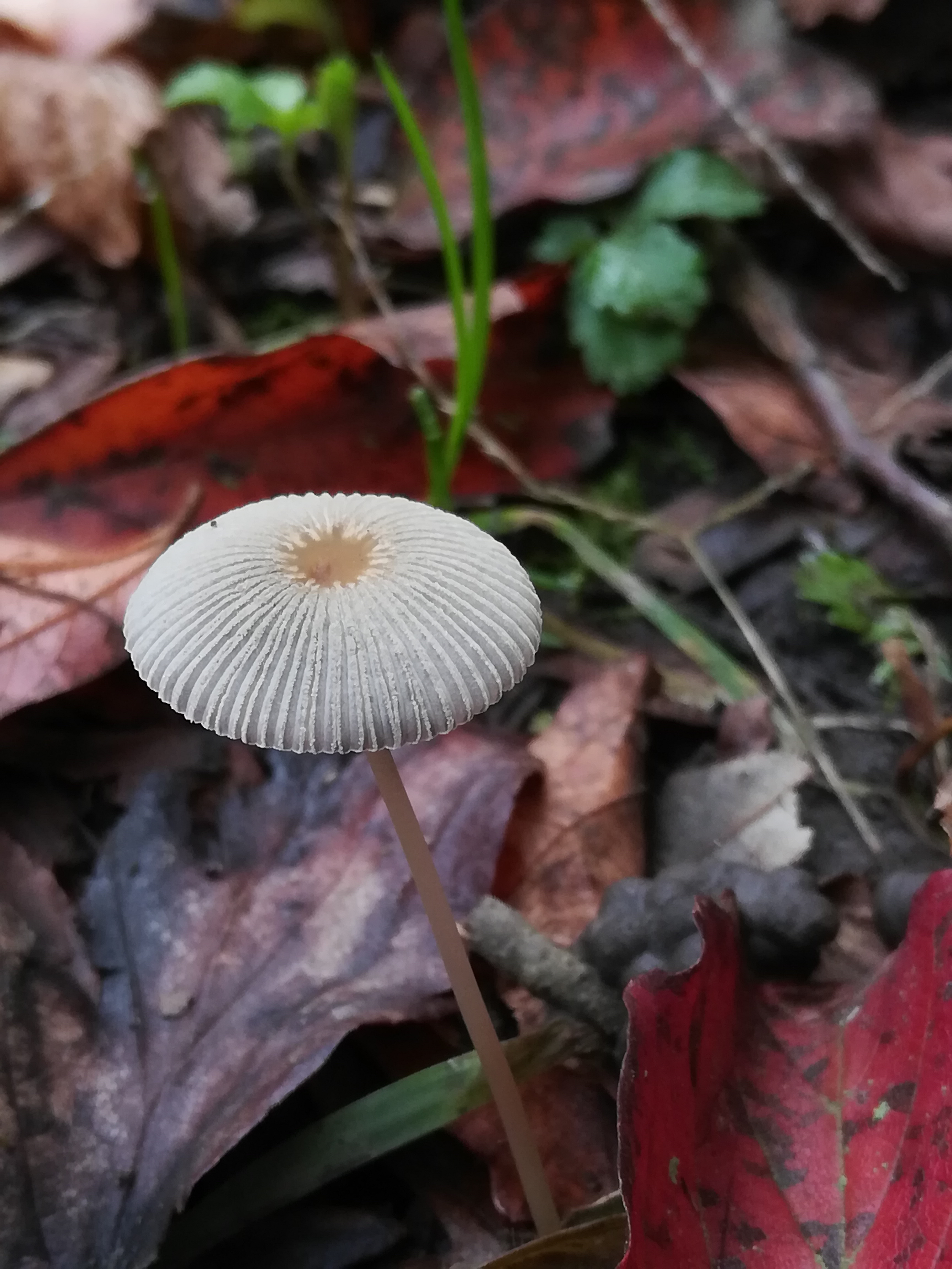 تصویر یک نمونه قارچ چتری در پارک جنگلی نور، مازندران، ایران. عکاس: شایان شیدایی